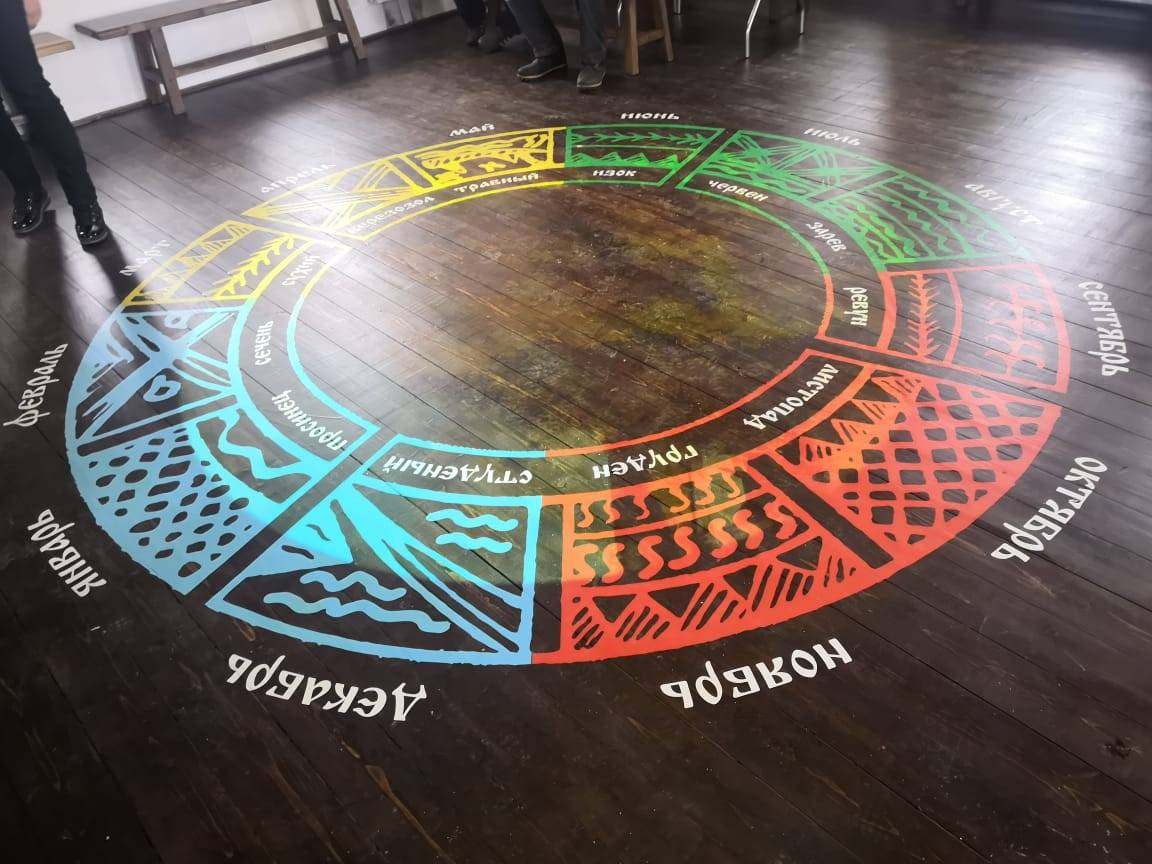 Музей счастья «Смоленские украсы». Третий ярус